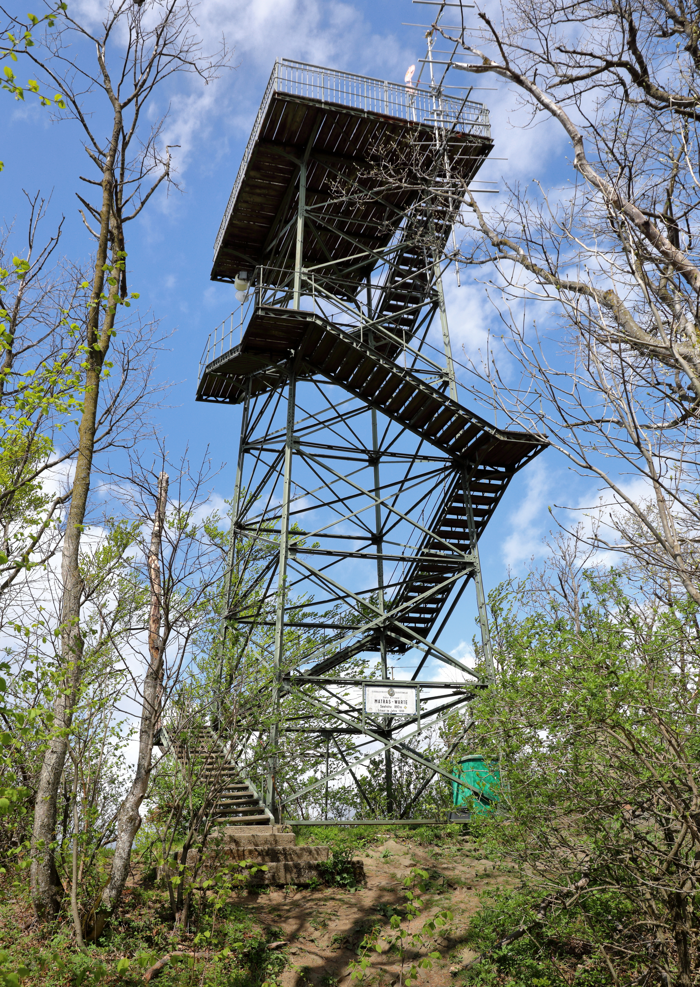 Südsüdostansicht der Matraswarte auf dem Gipfel des 893 m hohen Schöpfl und an der Gemeindegrenze der niederösterreichischen Gemeinden Brand-Laaben sowie Altenmarkt an der Triesting.Die als Eisenkonstruktion ausgeführte 17 m hohe Aussichtswarte wurde vom Österreichischen Touristenklub errichtet und anlässlich des fünfzigjährigen Regierungsjubiläum des Kaisers 1898 feierlich als „Kaiser-Franz-Joseph-Warte“ eröffnet. Im Jahr 1932, anlässlich des 70. Geburtstages von Franz Eduard Matras, Präsident des Österreichischen Touristenklubs, wurde sie in Matraswarte umbenannt.